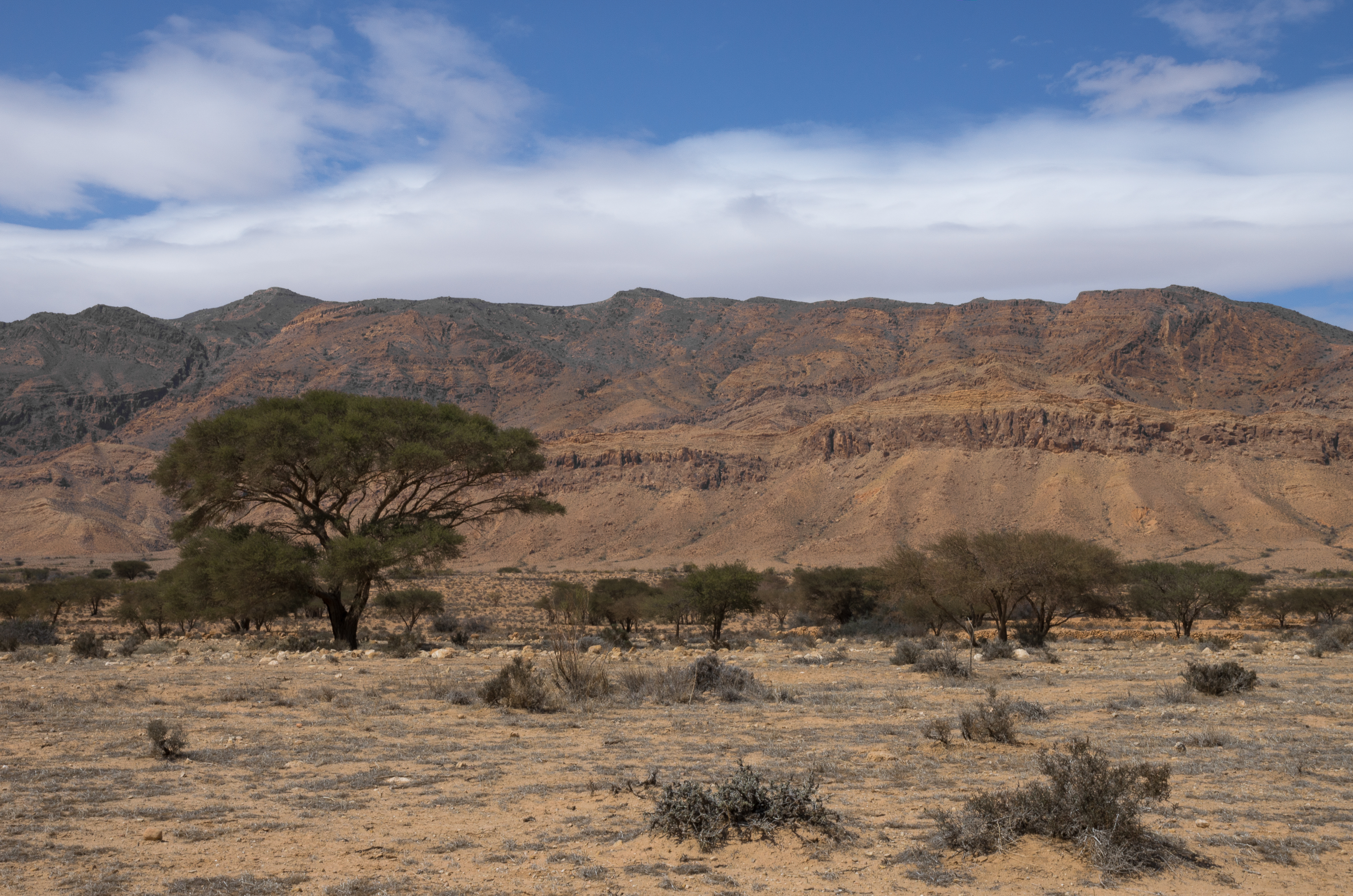 Parc national de Bouhedma (Gafsa et Sidi Bouzid, Tunisie)